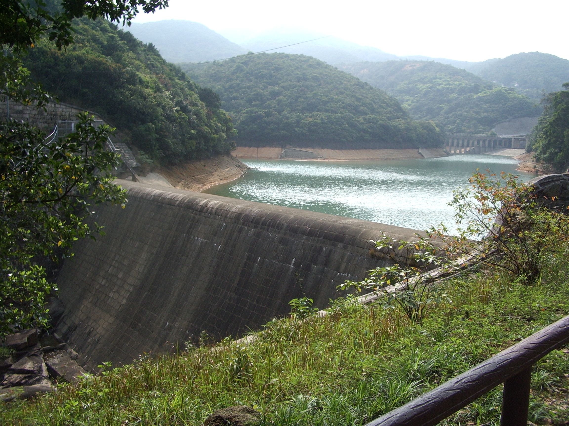 大潭副水塘的堤壩